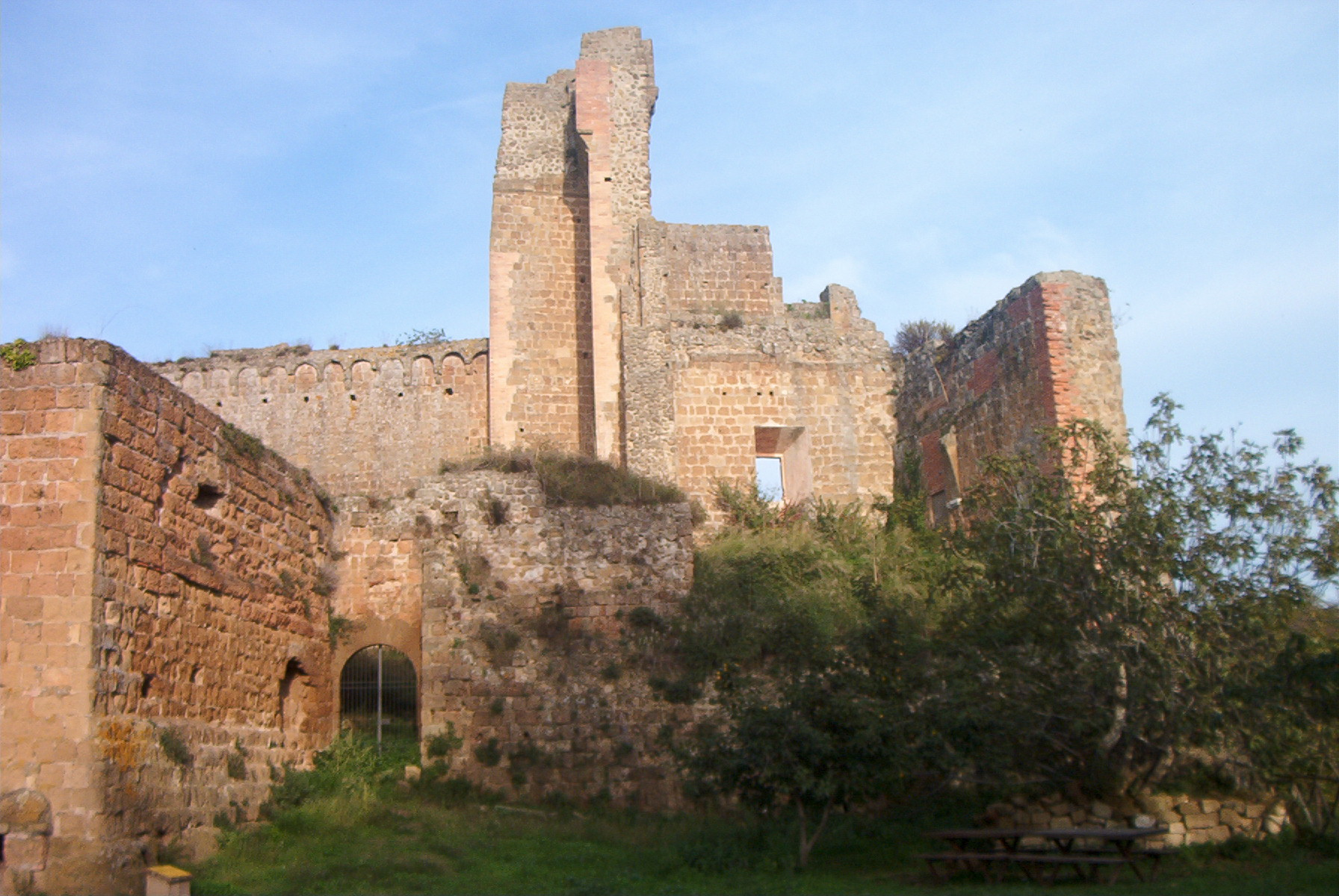 Burg der Aldobrandeci in Sovana/IT